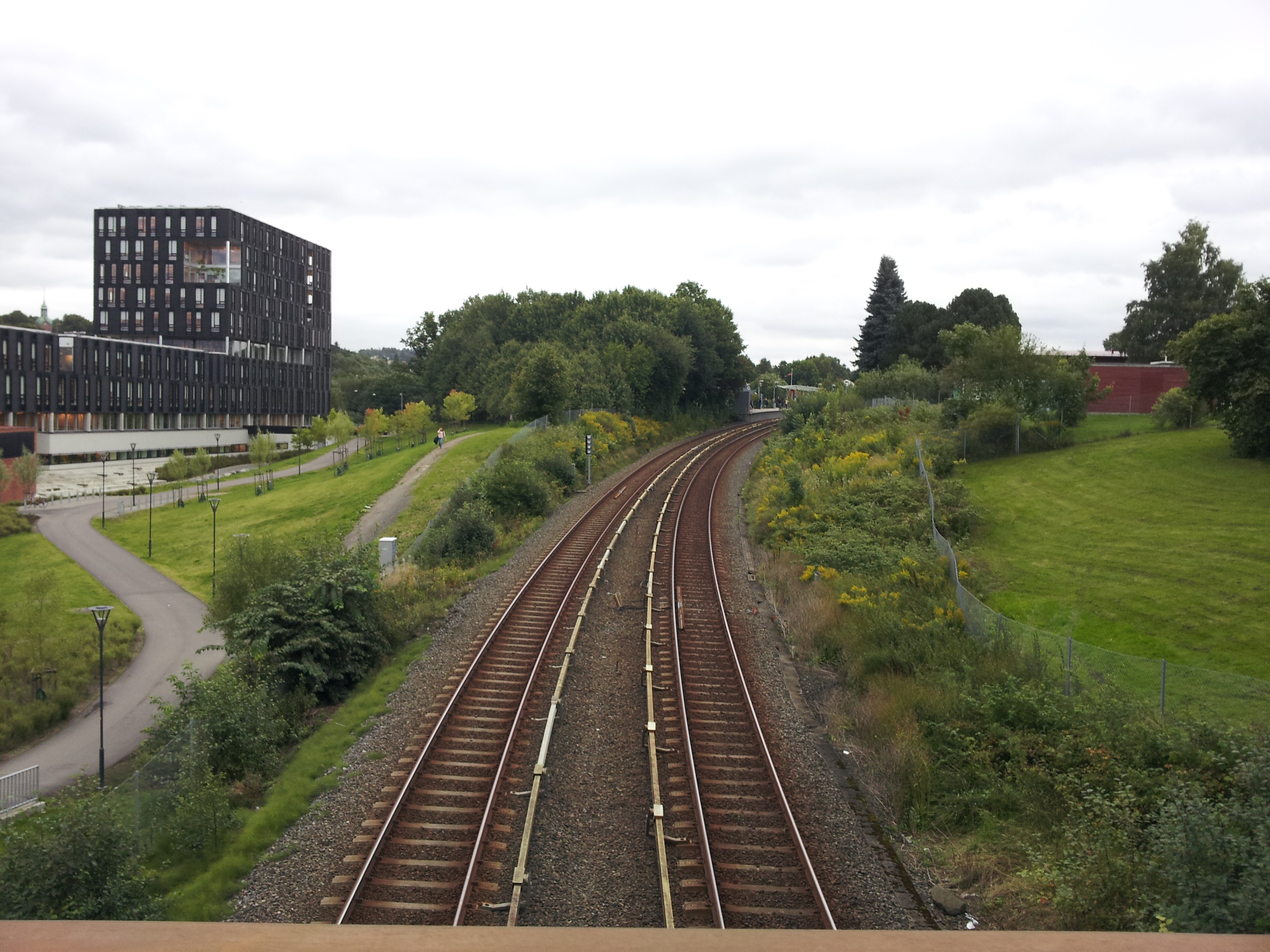 Sognsvannsbanen mellom Blindern i øst (til høyre) og Gaustadbekkdalen i vest (til venstre)